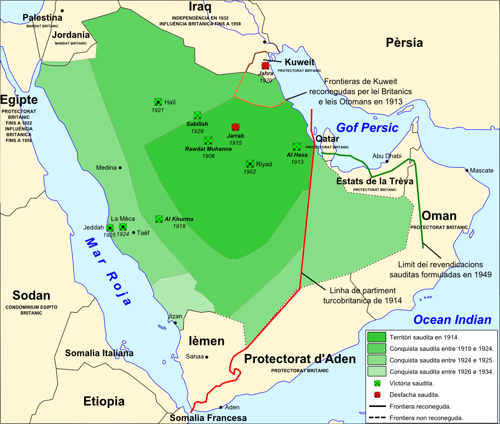 Expansion dau territòri saudita entre 1914 e 1934.